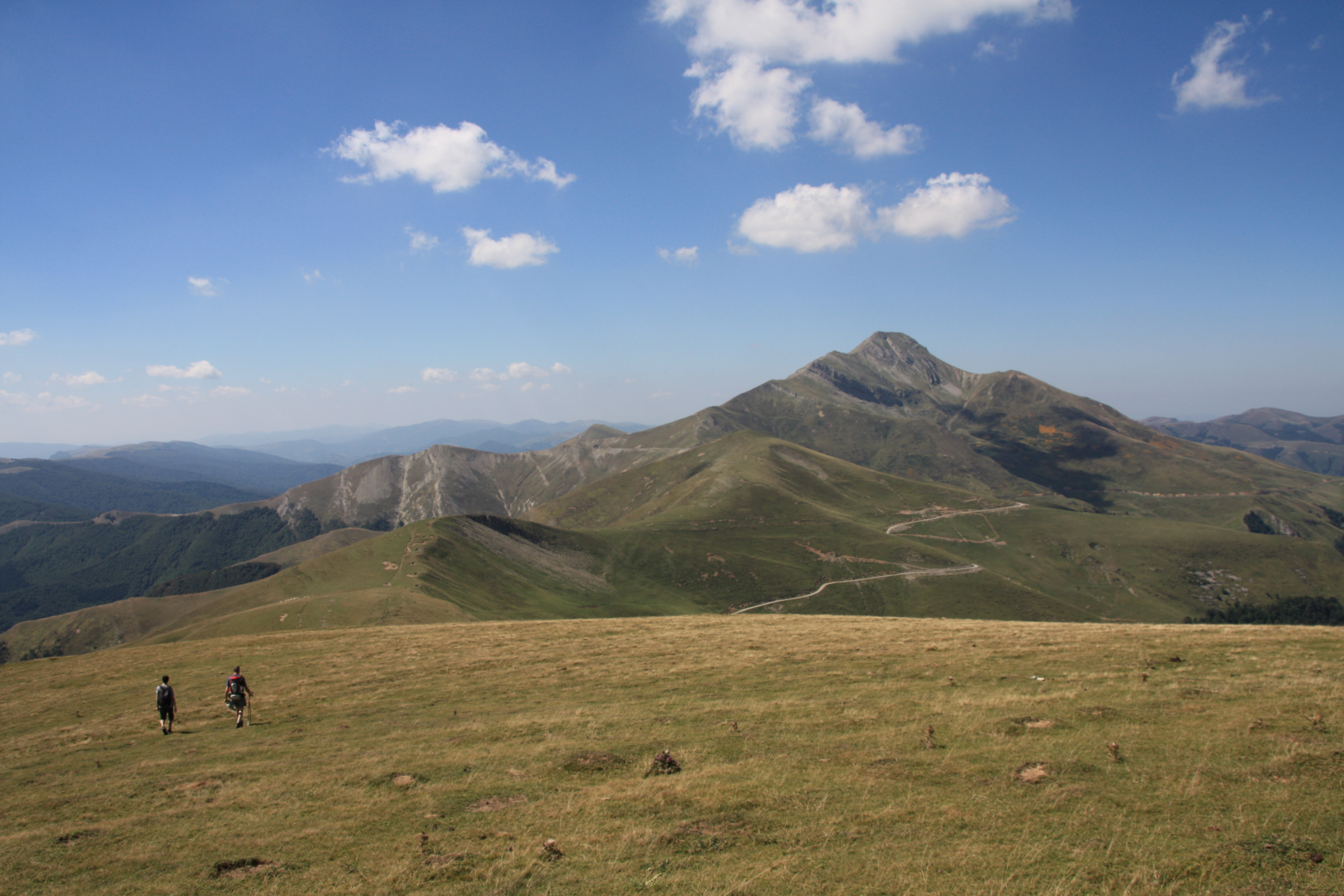 Orhiren ikuspegia Gaztarriatik.